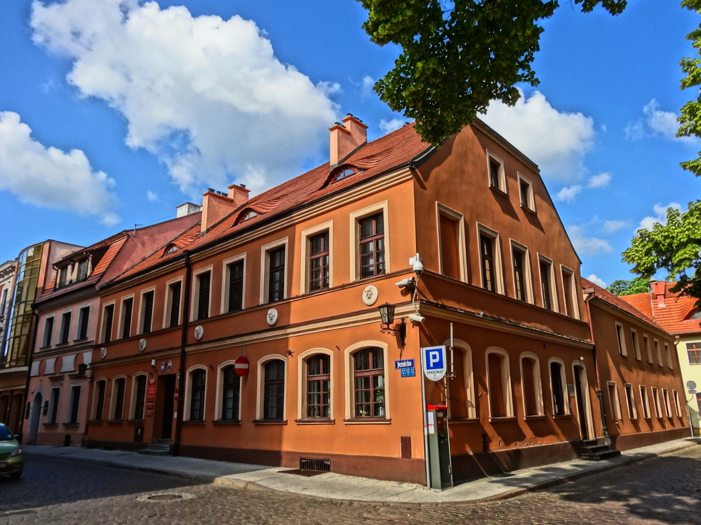 Kamienica przy ul. Jezuickiej 2 w Bydgoszczy